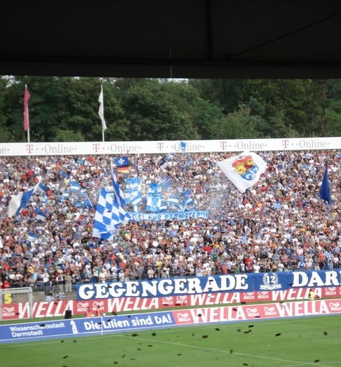 SV Darmstadt 98 - Hertha BSC Berlin (2007): Gegengerade beim Einlauf